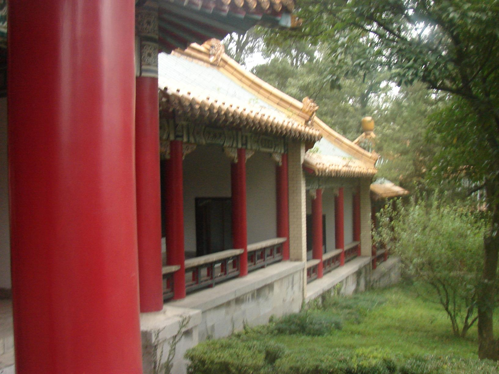 南京孙中山纪念馆回廊